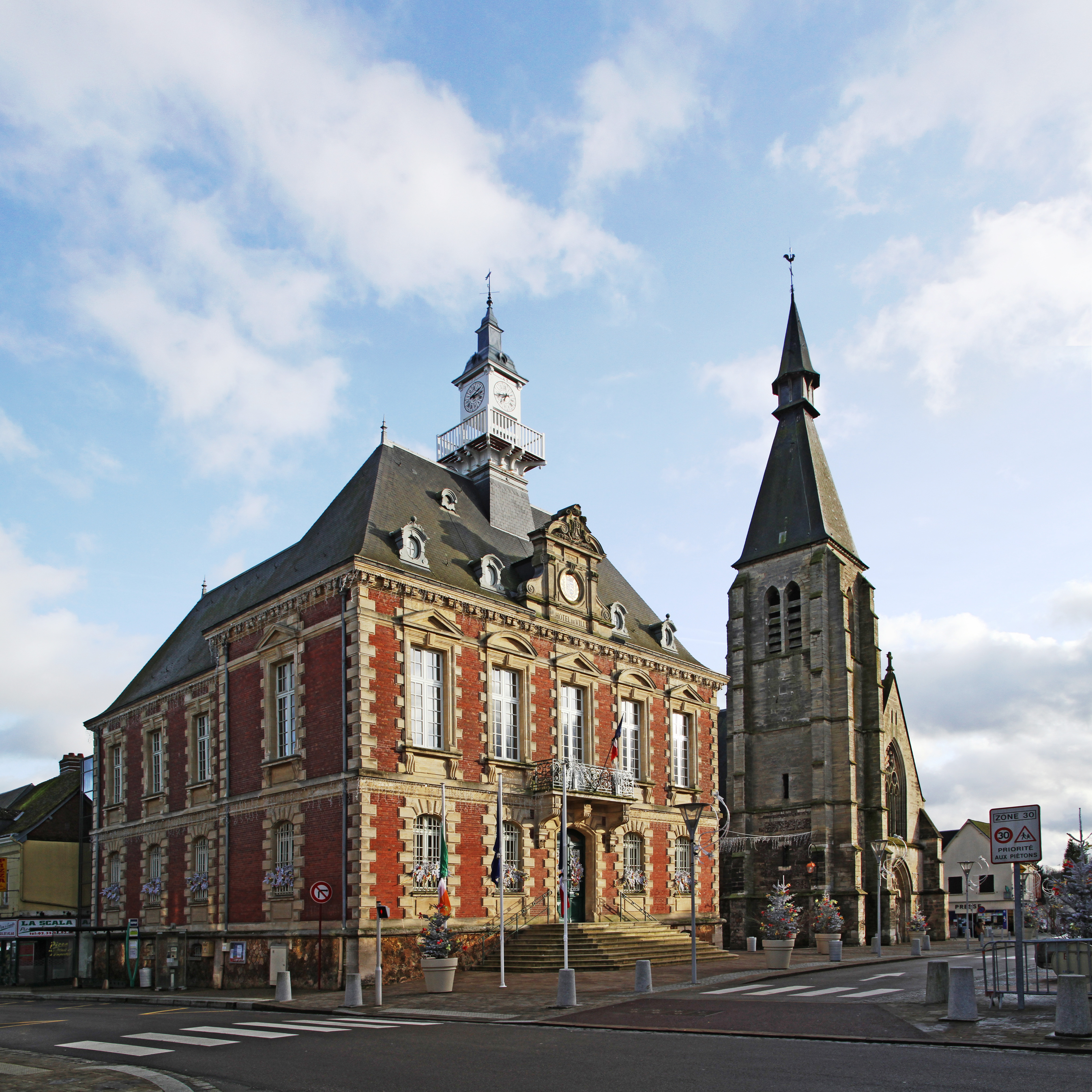 Église et mairie d'Étrépagny